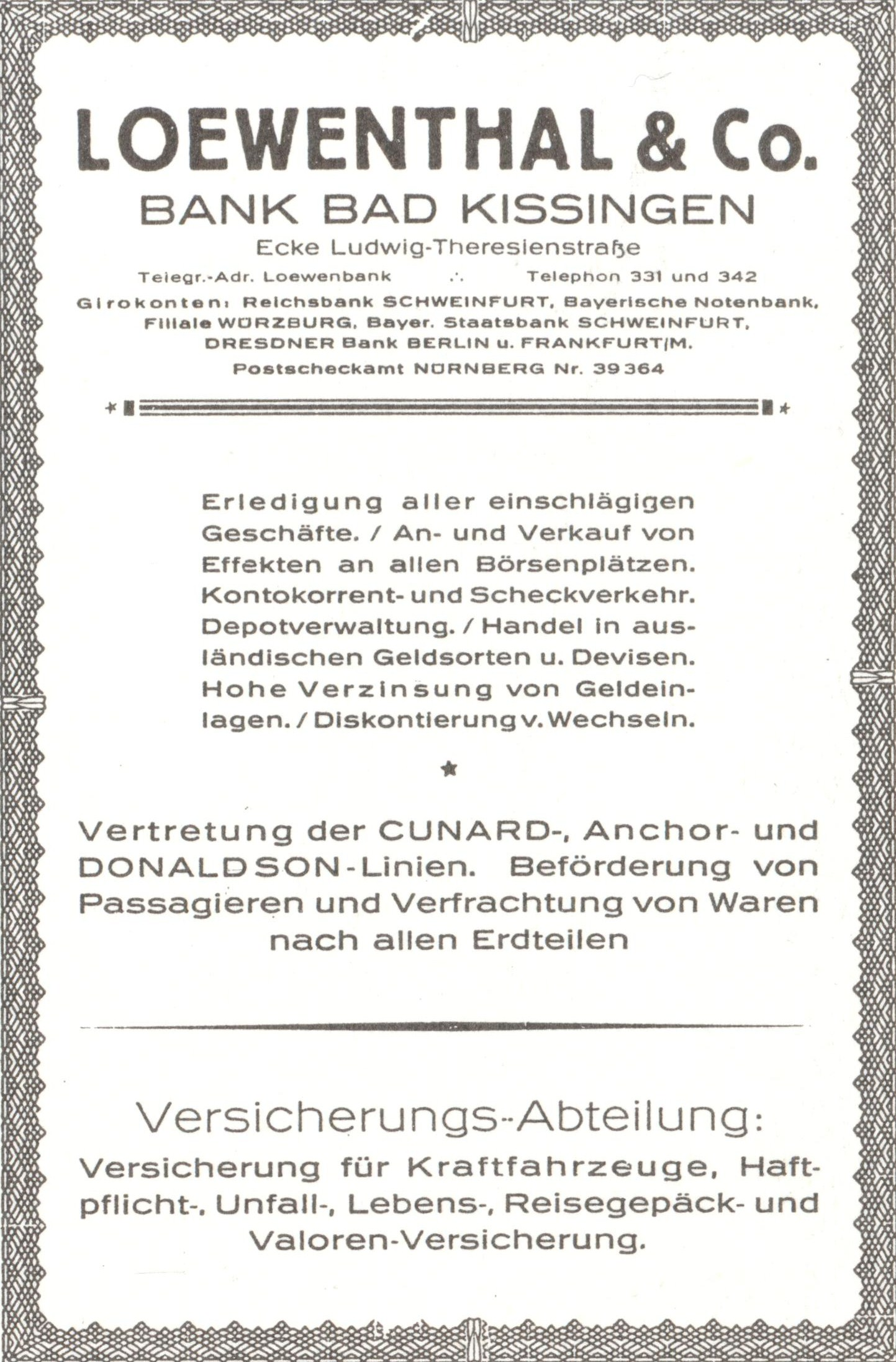 Anzeige des Bankhauses Loewenthal in Bad Kissingen aus den 1920er Jahren